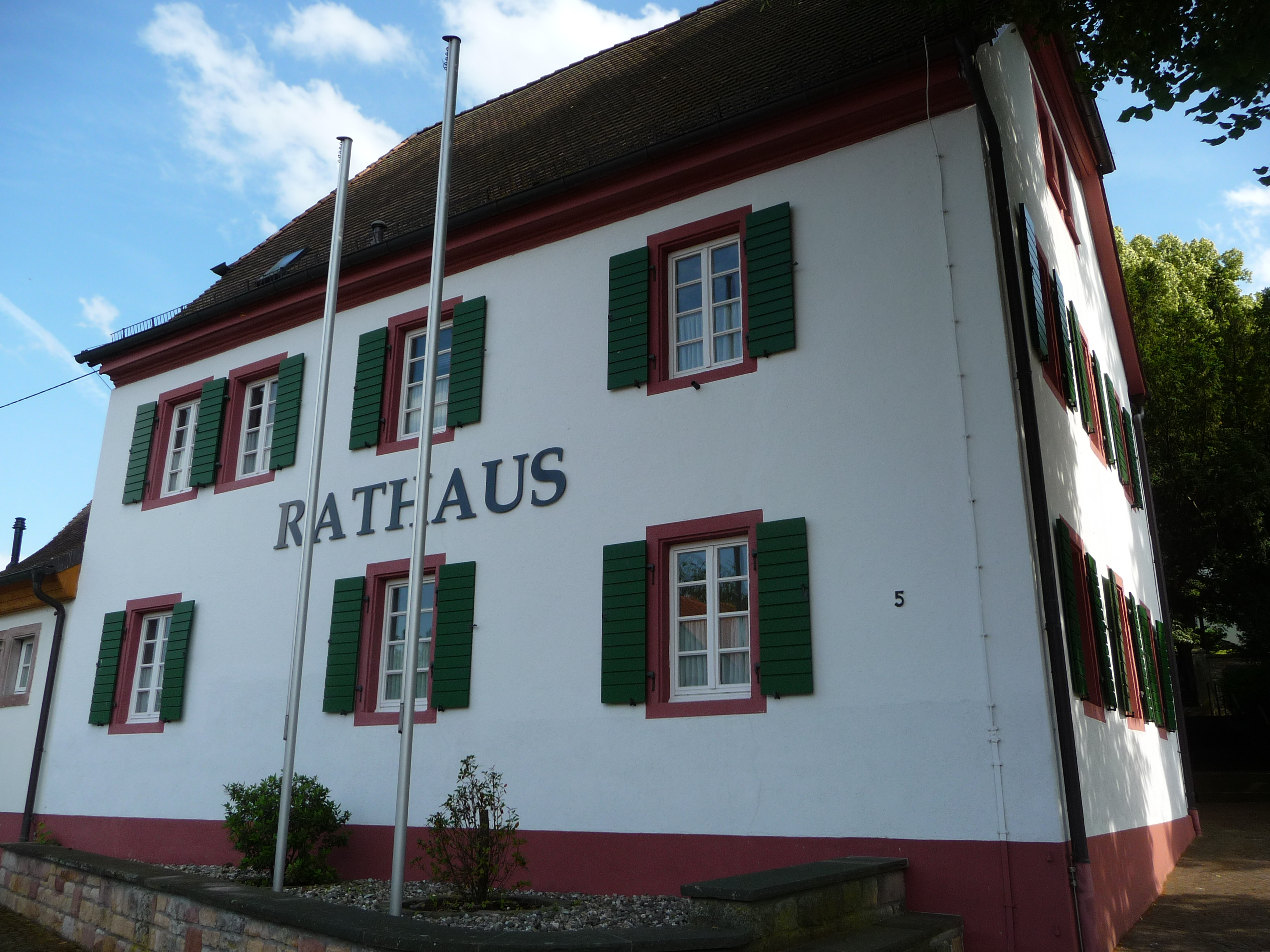 Rathaus Hauptstraße 5 in Walsheim; ehemaliger protestantischer Pfarrhof. Walsheim ist eine Ortsgemeinde im Landkreis Südliche Weinstraße in Rheinland-Pfalz.